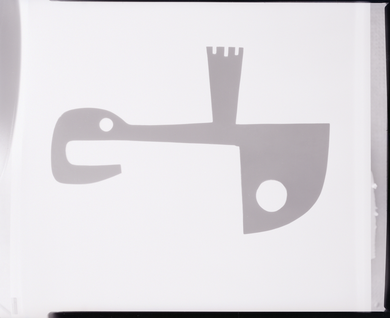 Servizio fotografico : France, 1964 / Paolo Monti. - Buste: 4, Fototipi: 4 : Negativo b/n, gelatina bromuro d'argento/ pellicola ; 10x12. - ((Serie costituita da 4 buste sciolte di negativi identificati con i nn.: 10227, 10228, 10229, 10230. - Nell'agenda citata nel campo Fonti in corrispondenza degli estremi numerici identificativi della serie iscrizione didascalica e documentaria manoscritta: "Dott. Franci: particolari pezzi singoli delle collezioni dello scultore Berto Lardera in Francia/ Sala posa Dino". - Occasione: Documentazione per la pubblicazione: Sereni Vittorio, "Appuntamento a ora insolita", Milano, Strenna per gli amici, 1964. - Fonte: Agenda di Paolo Monti: Monti/ 2/ 6 giugno 1964 - 31 marzo 1966/ 8194-12420 (1964-1966), presso Archivio Paolo Monti. - Fonte: Monografia di Sereni, Vittorio: Appuntamento a ora insolita, Milano, Strenna per gli amici (1964). Fotografie di Paolo Monti "dalla scultura di Berto Lardera 'Jouet pour adultes' 1964"